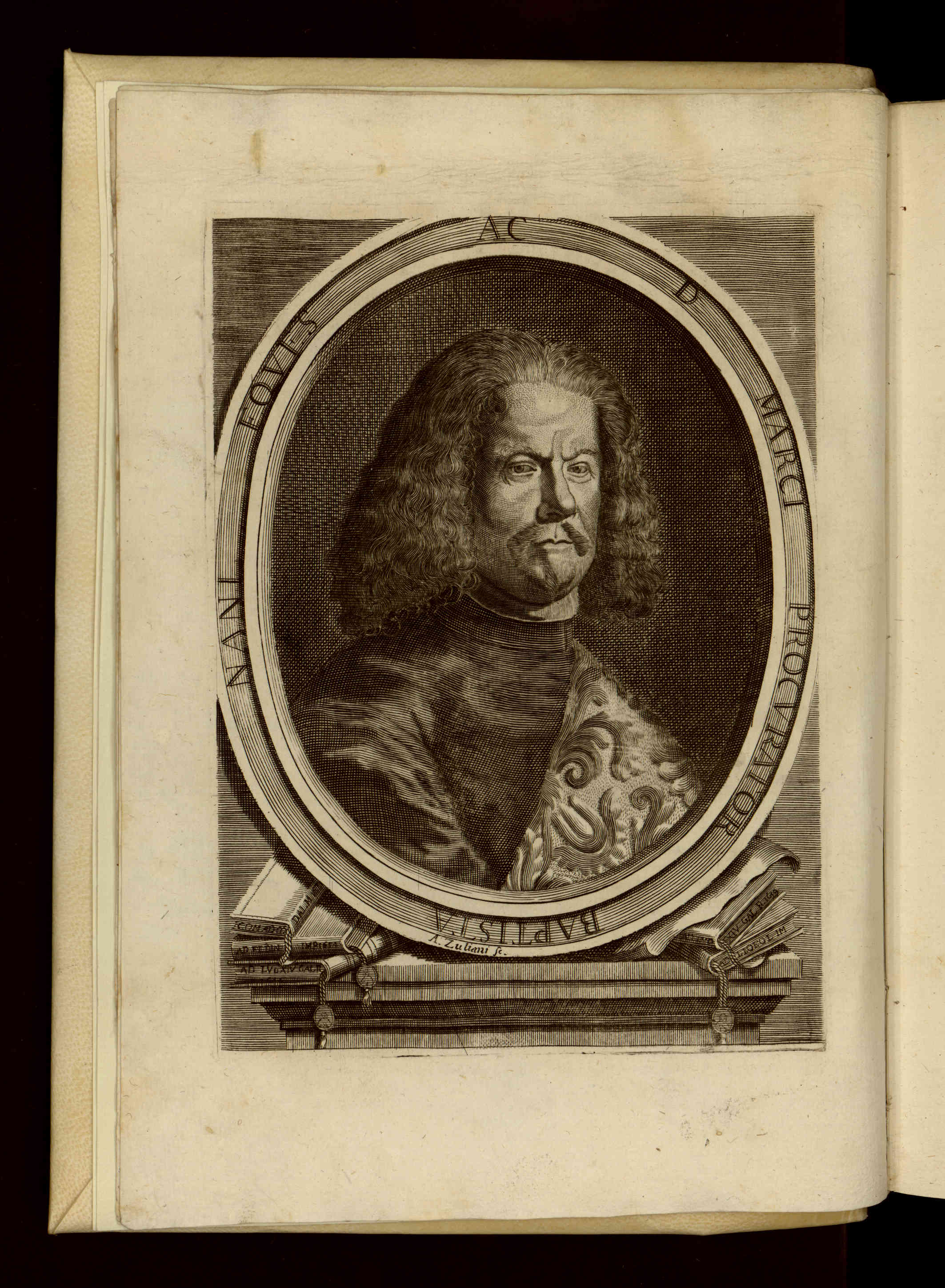 8: Tomo ottavo, che comprende la parte prima dell'Istoria della repubblica veneta di Batista Nani, cavaliere e proccuratore. Aggiuntavi la vita dell'autore, e indici copiosi. - In Venezia : appresso il Lovisa, 1720. - [4], XXVII, [1] 768 p. : ritr. ; 4º . Ritratto (vedi sopra, rif. alla data di compilazione)